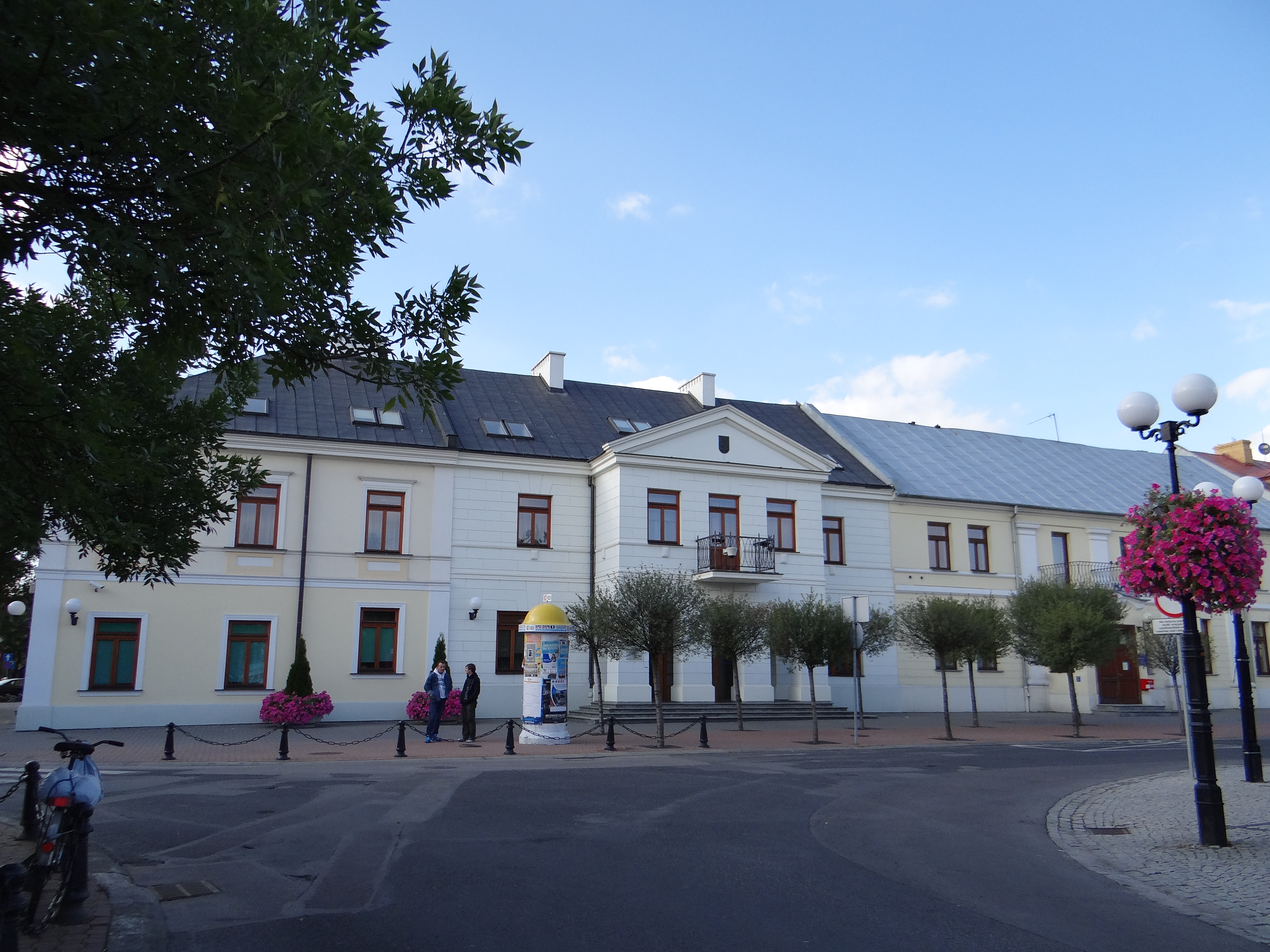 Biała Podlaska, Rynek 8 - magistrat, 1835